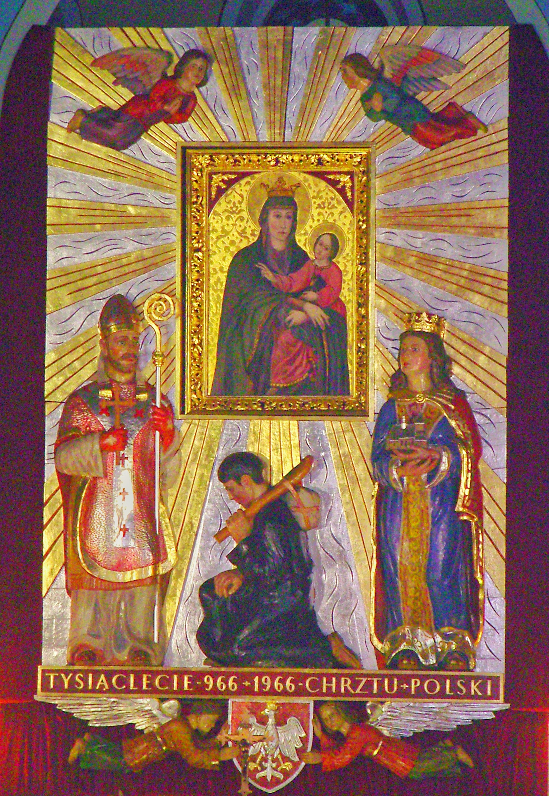 Retabulum ołtarza głównego z łaskami słynącym obrazem Matki Bożej Bączalskiej w kościele Imienia Maryi w Bączalu Dolnym (diecezja rzeszowska)